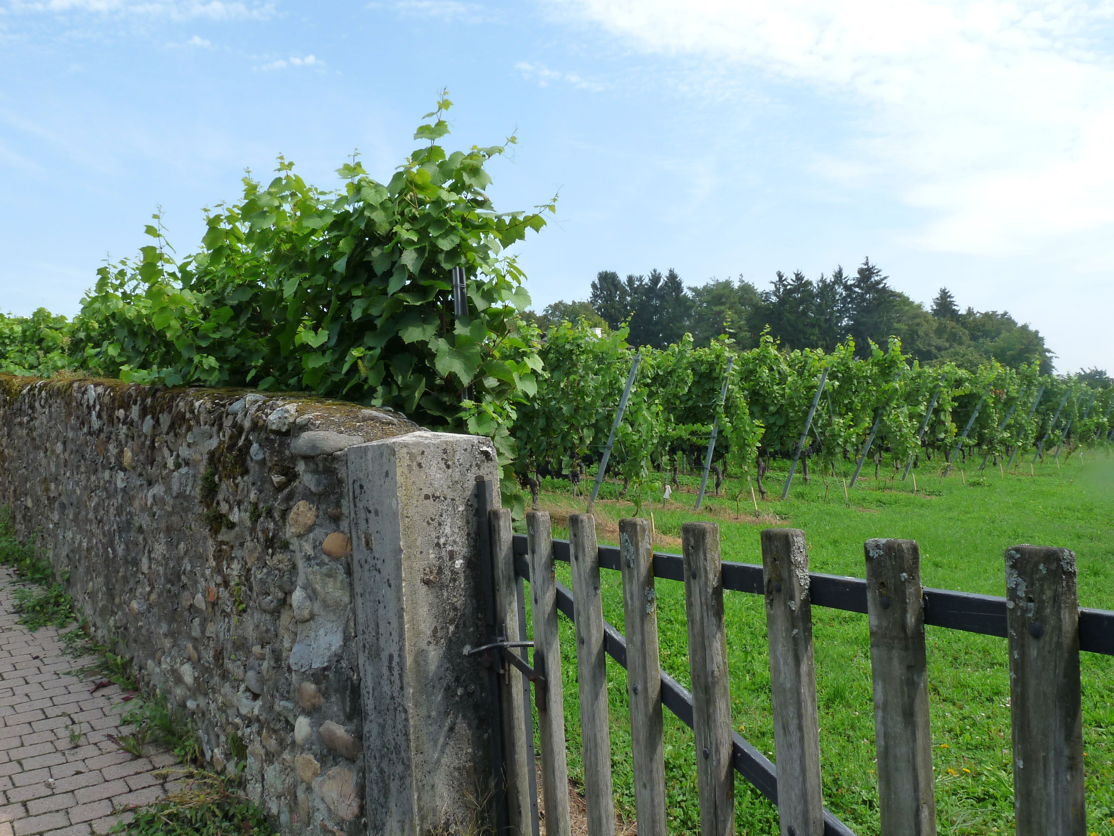 Commugny (canton de Vaud, Suisse) : murets de pierre et vignes